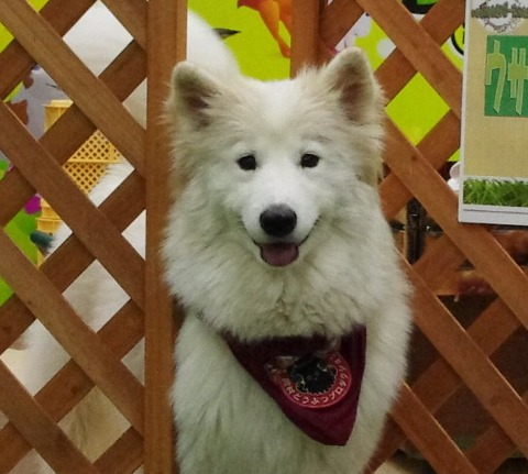 岡村動物プロダクション所属